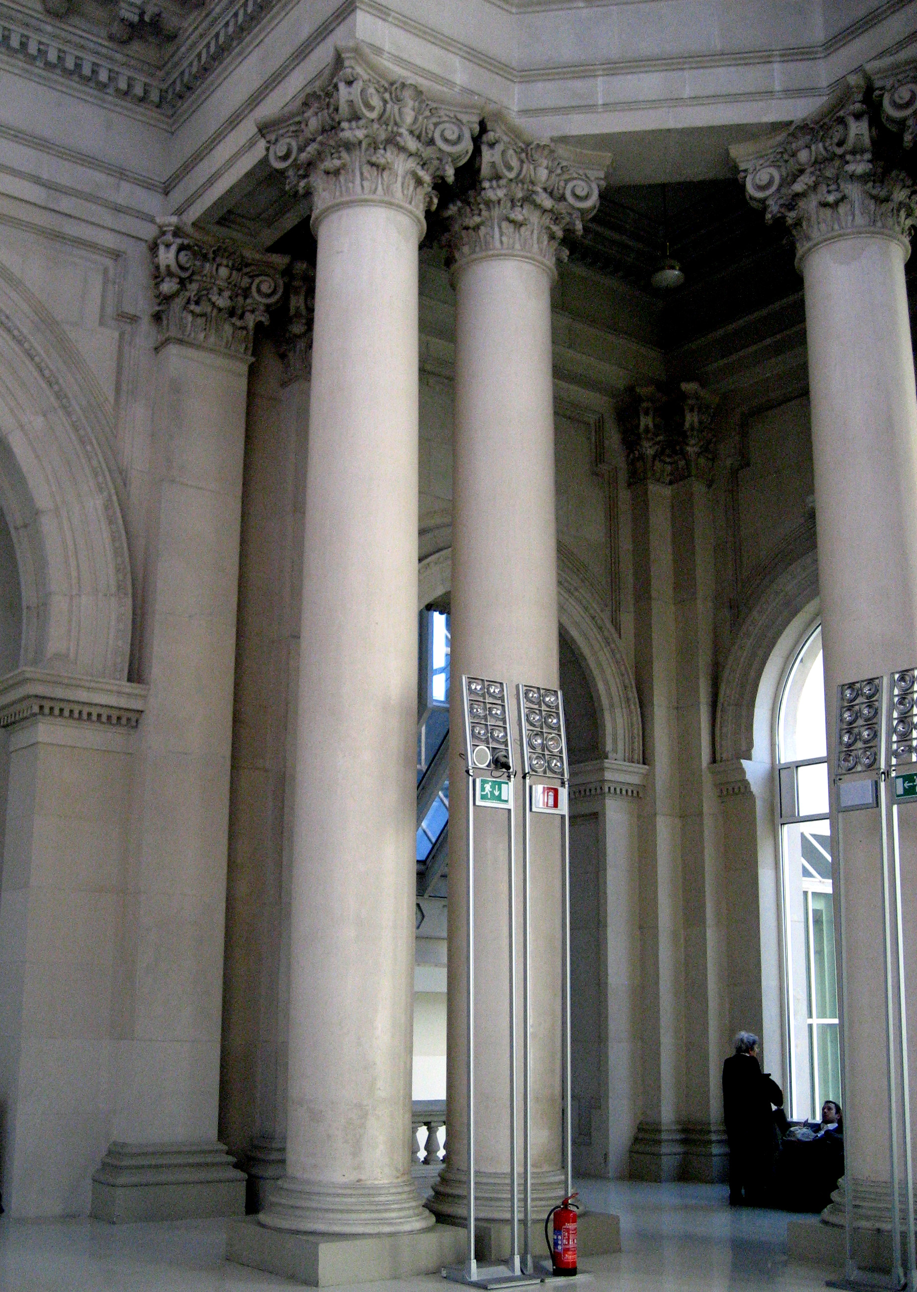 Columnas de la Gran Cúpula del Palacio Nacional de Barcelona, Cataluña, Spain.